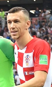 Стартовый состав сборной Хорватии перед финалом чемпионата мира 2018 в России